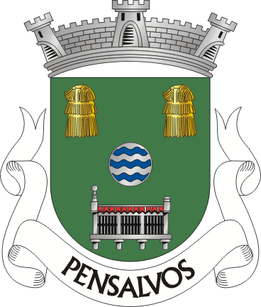 Brasão da freguesia de Pensalvos (concelho de Vila Pouca de Aguiar)